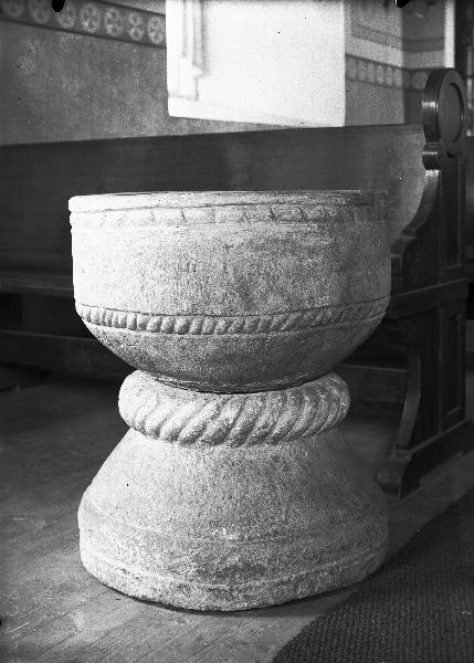 Dopfunt av sandsten, 1100- eller 1200-talet. Kategori: (04) DopfuntarDopfunt av sandsten, 1100- eller 1200-talet.